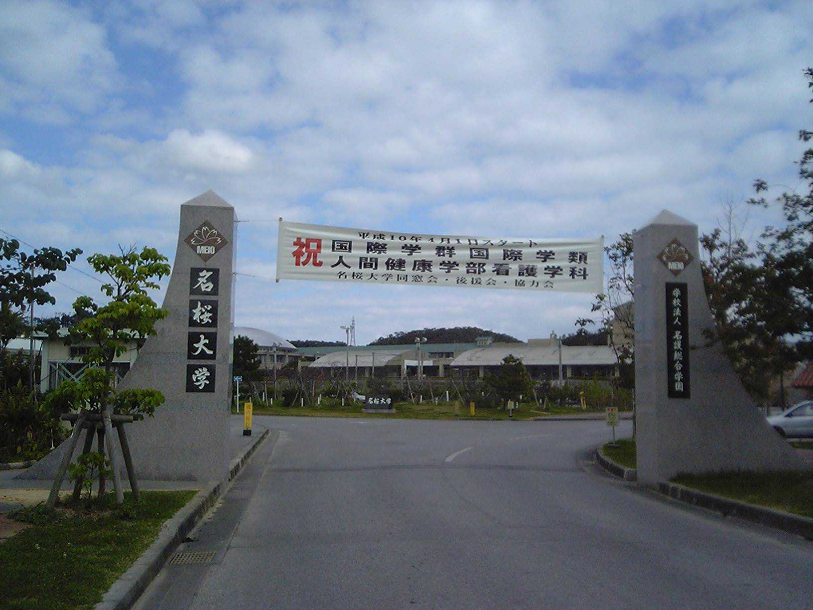 名桜大学2007年2月4日投稿者が撮影